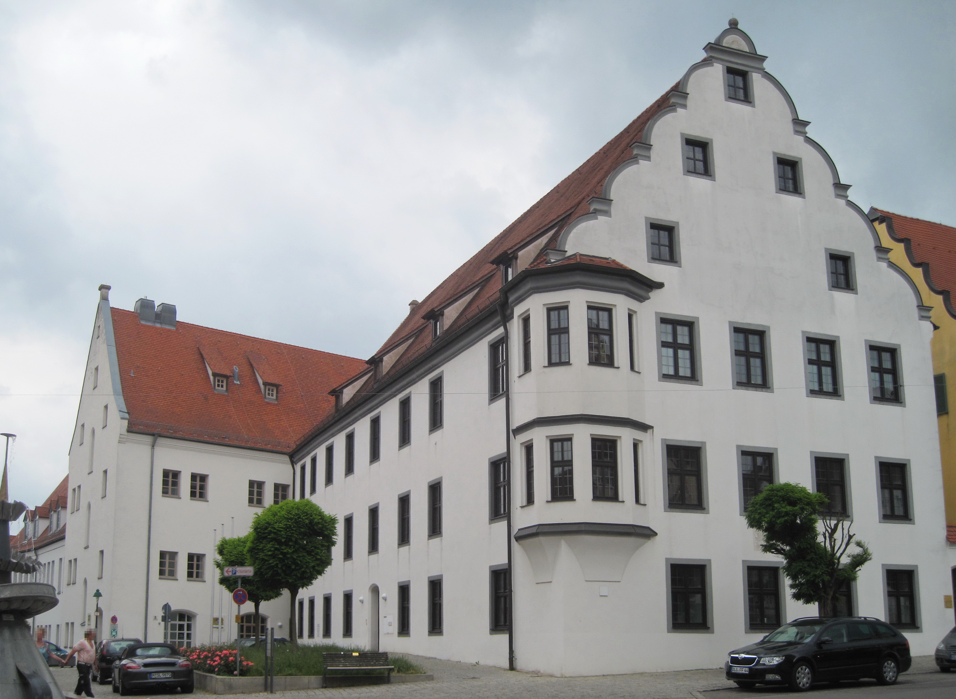 Amtsgericht Nördlingen, Tändelmarkt 5/Ecke Hafenmarkt in Nördlingen.